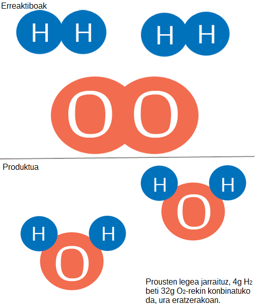 Ura sortzeko gertatzen den erreakzioa, bestela esanda, dihidrogeno eta dioxigenoaren arteko lotura kobalentea.